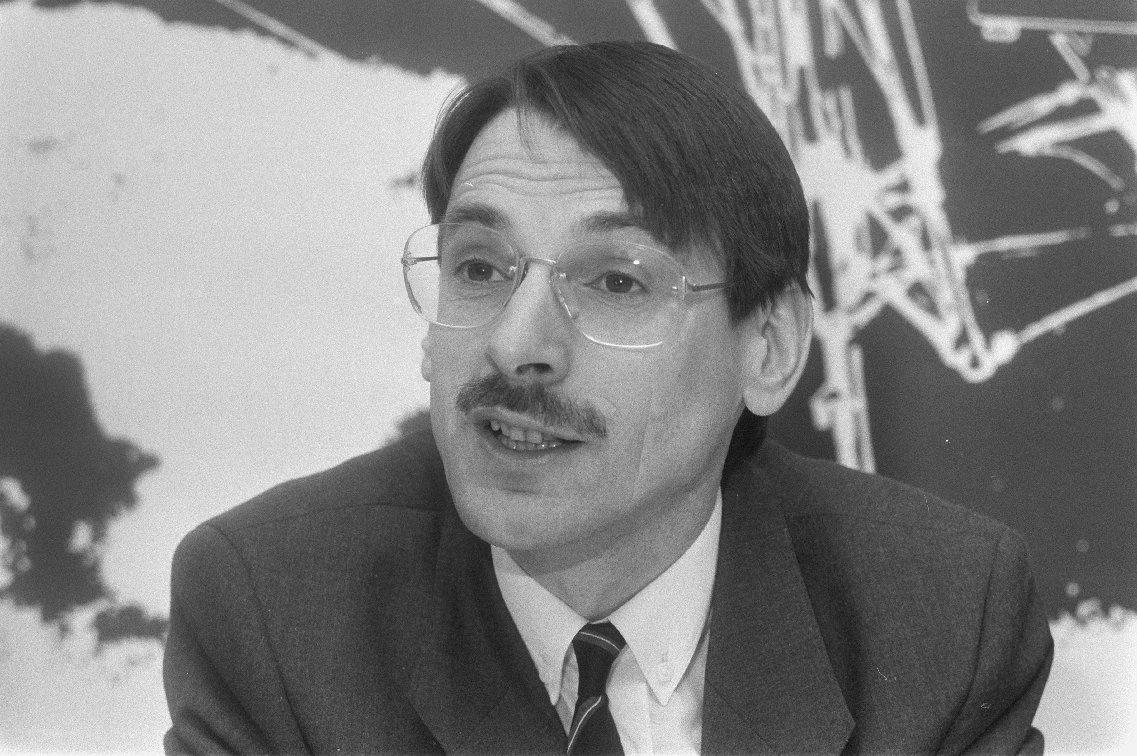 Collectie / Archief : Fotocollectie Anefo Reportage / Serie : In Nieuwspoort bood professor J. Ritzen het rapport "Werk maken" aan aan J. den Uyl en Max van den Berg Beschrijving : J. Ritzen Datum : 3 april 1986 Locatie : Den Haag, Zuid-Holland Trefwoorden : hoogleraren, portretten Persoonsnaam : Ritzen, Jo Fotograaf : Gerrits, Roland / Anefo Auteursrechthebbende : Nationaal Archief Materiaalsoort : Negatief (zwart/wit) Nummer archiefinventaris : bekijk toegang 2.24.01.05 Bestanddeelnummer : 933-6159